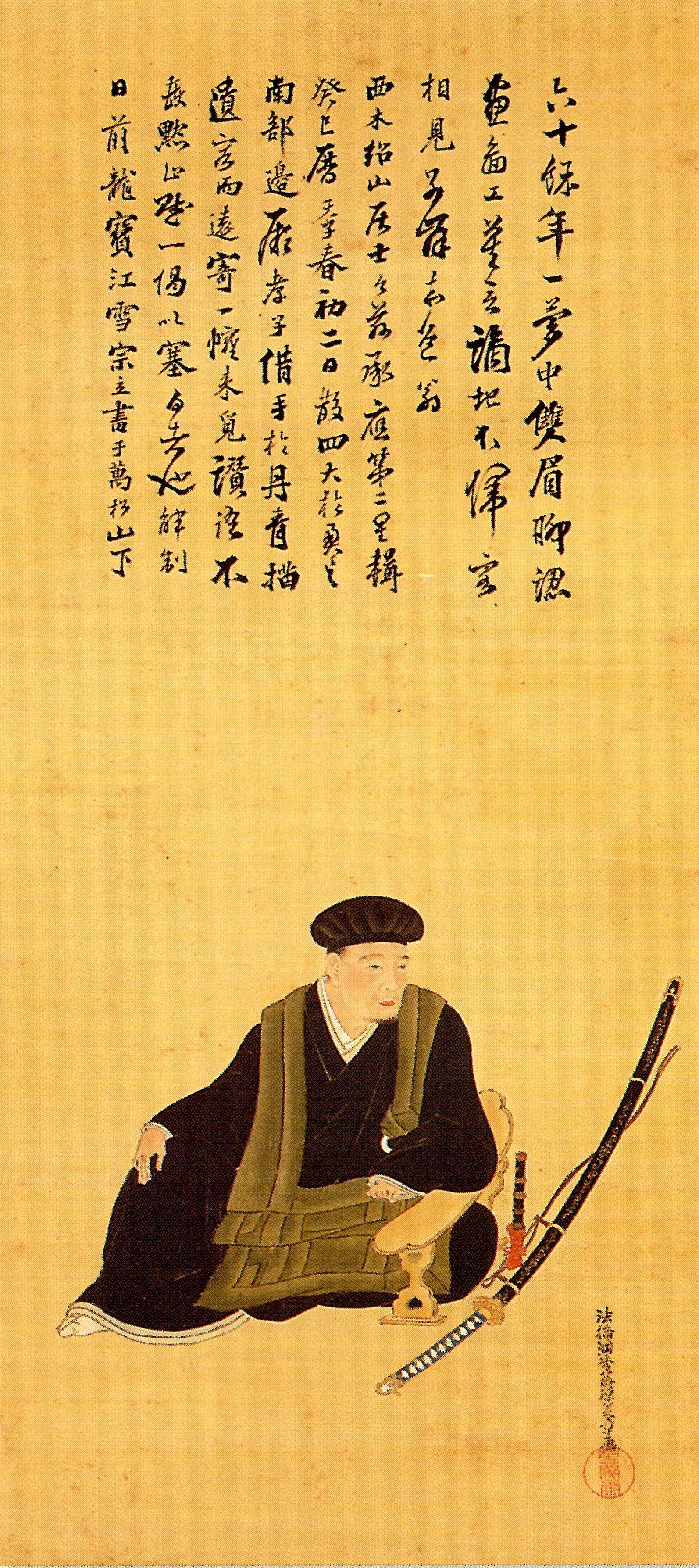 栗山(大膳)利章の肖像。